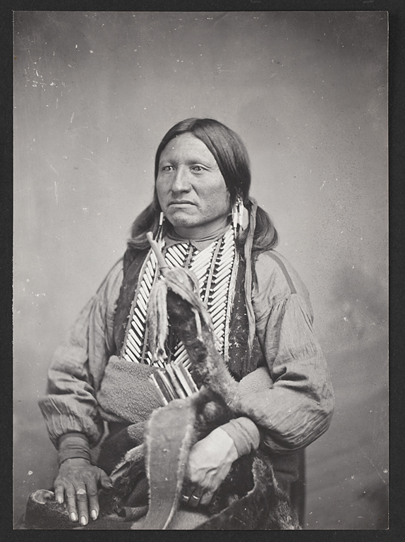 Chief Kicking Bird